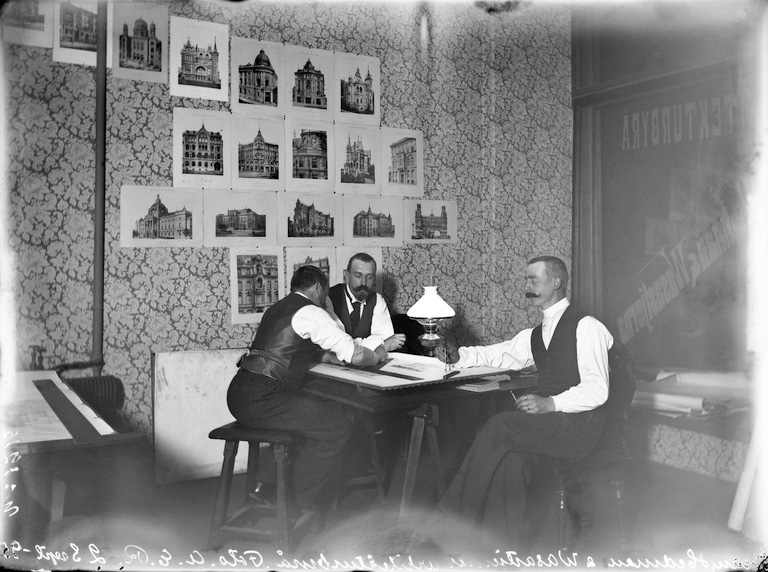 Grahn, Hedman & Wasastjerna på arkitektkontoret på Aleksanterinkatu (Central Passagen)